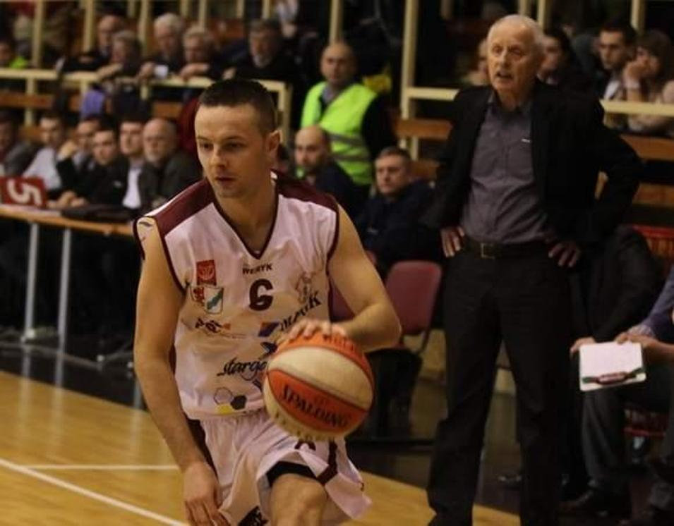 Trener Spójni Tadeusz Aleksandrowicz (2010)